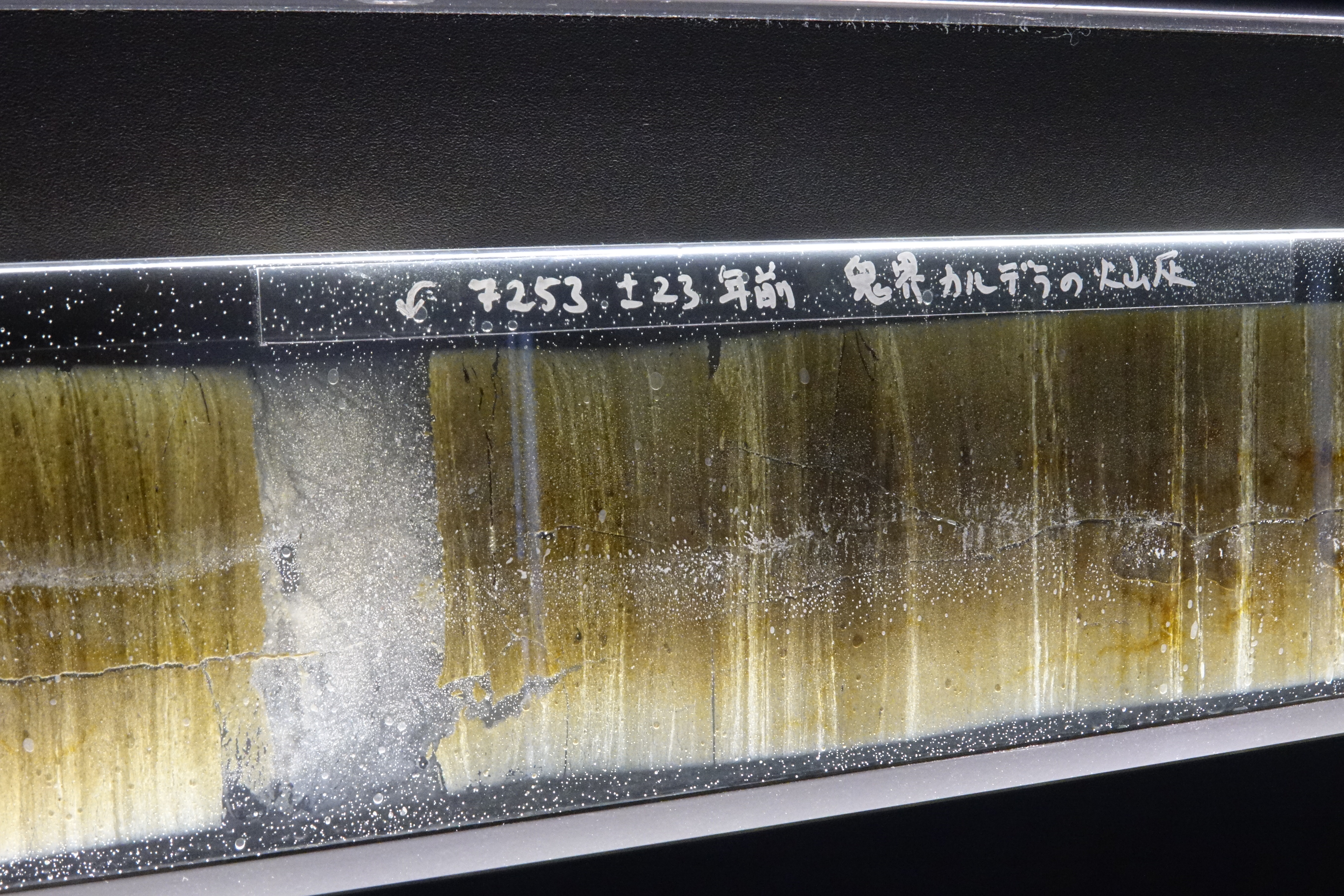 水月湖の年縞における鬼界カルデラの火山灰層